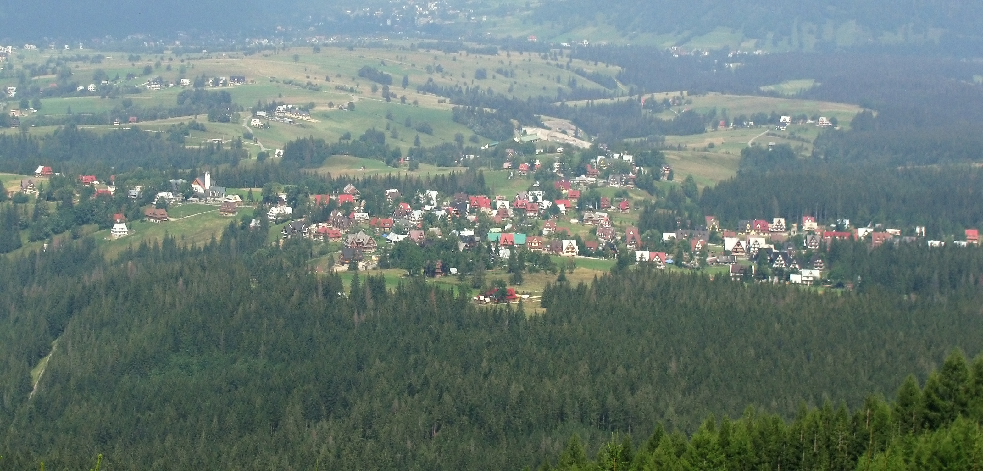 Toporowa Cyrhla, widok z Wielkiego Kopieńca.